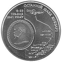 Монета Останній шлях Кобзаря реверс